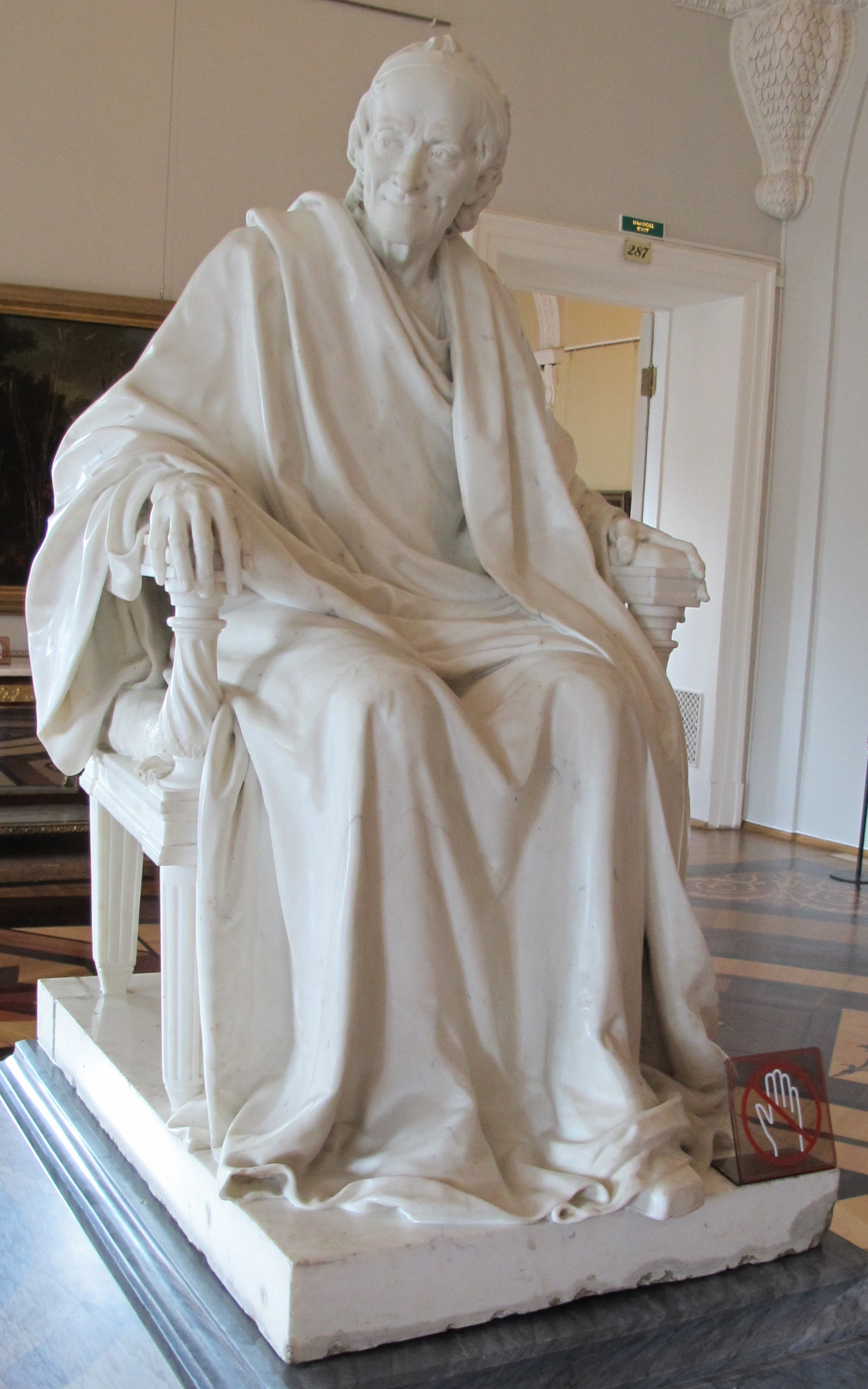 Jean-Antoine Houdon, voltaire, 1781